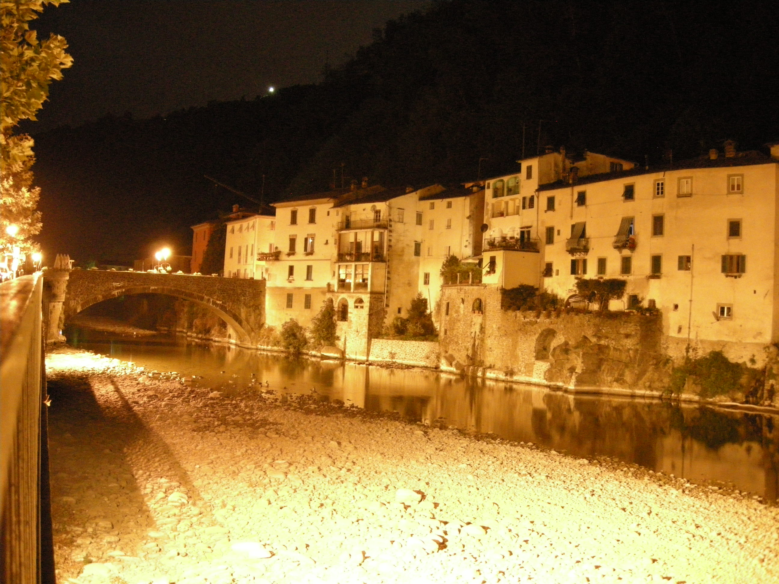 Bagni di lucca di notte